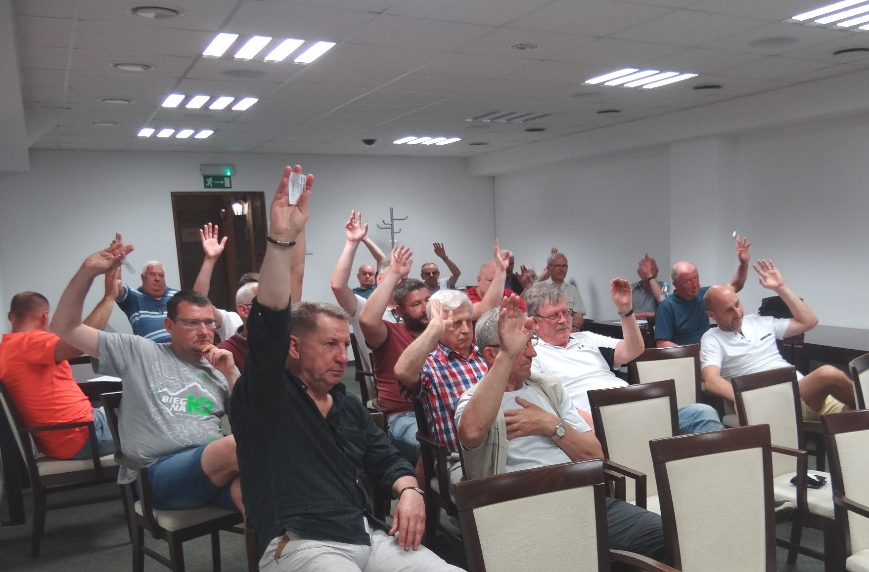 Zebranie walne Spójni Stargard (29.05.2018)